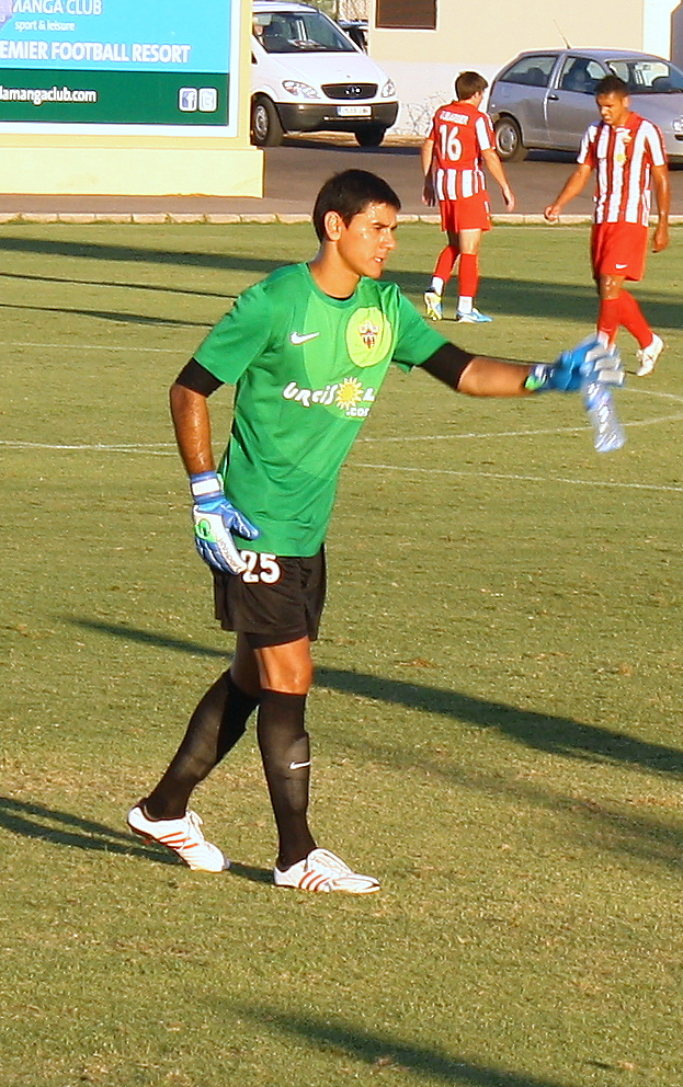 Fotografía de Ustari, jugador de la U.D. Almería